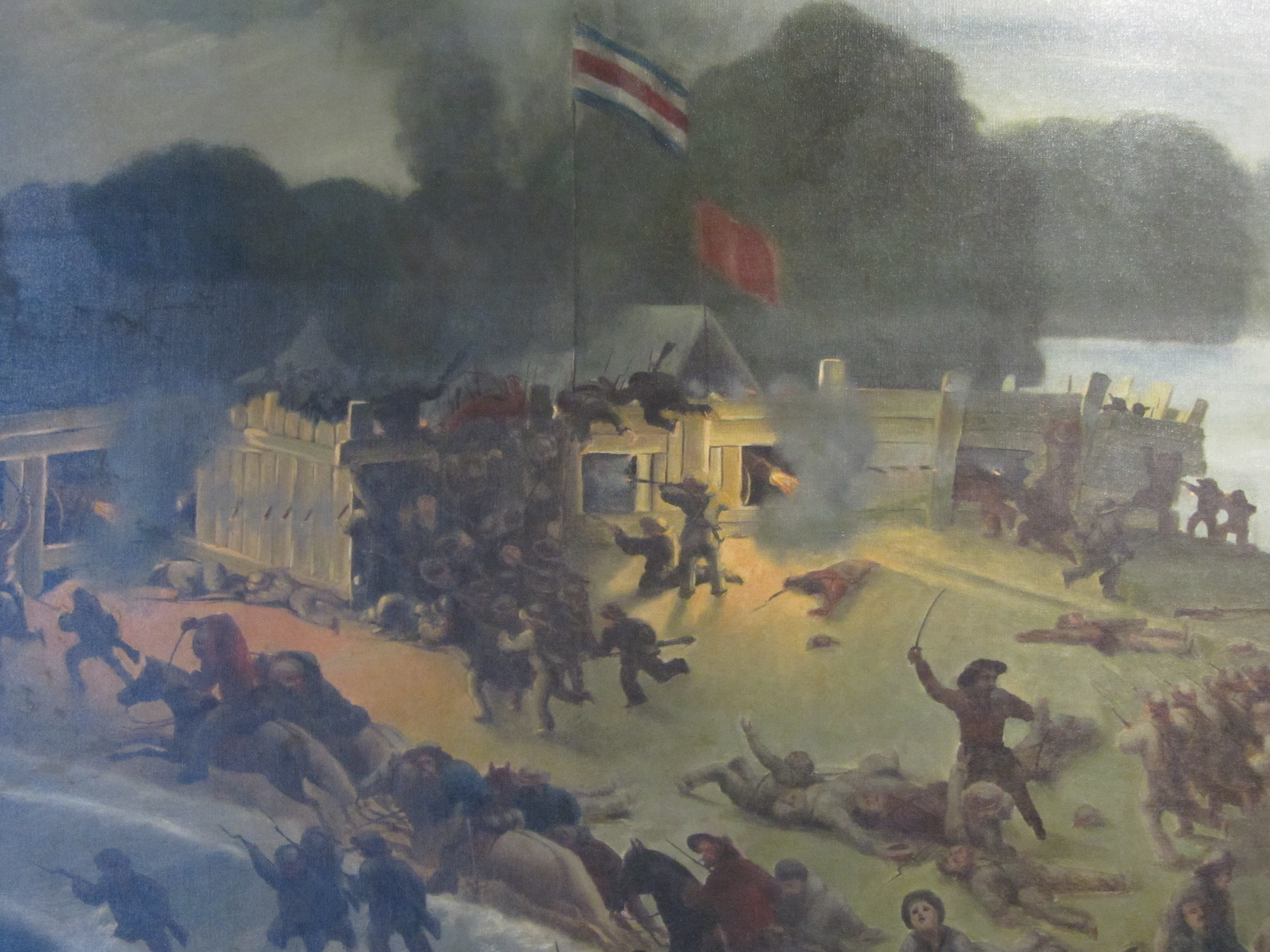 El combate de La Angostura; detalle del cuadro por Lorenzo Fortino, Museo Histórico Cultural Juan Santamaría, Alajuela, Costa Rica